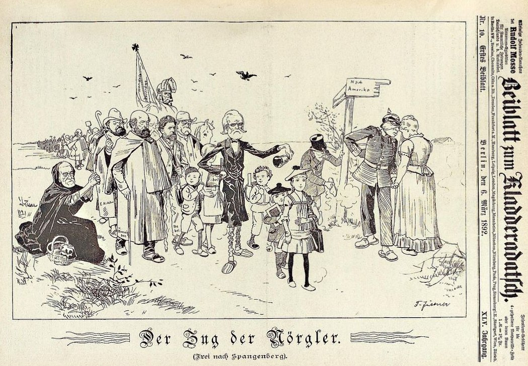 Der Zug der Nörgler, Karikatur von Jüttner erschienen im Kladderadatsch am 6. März 1892